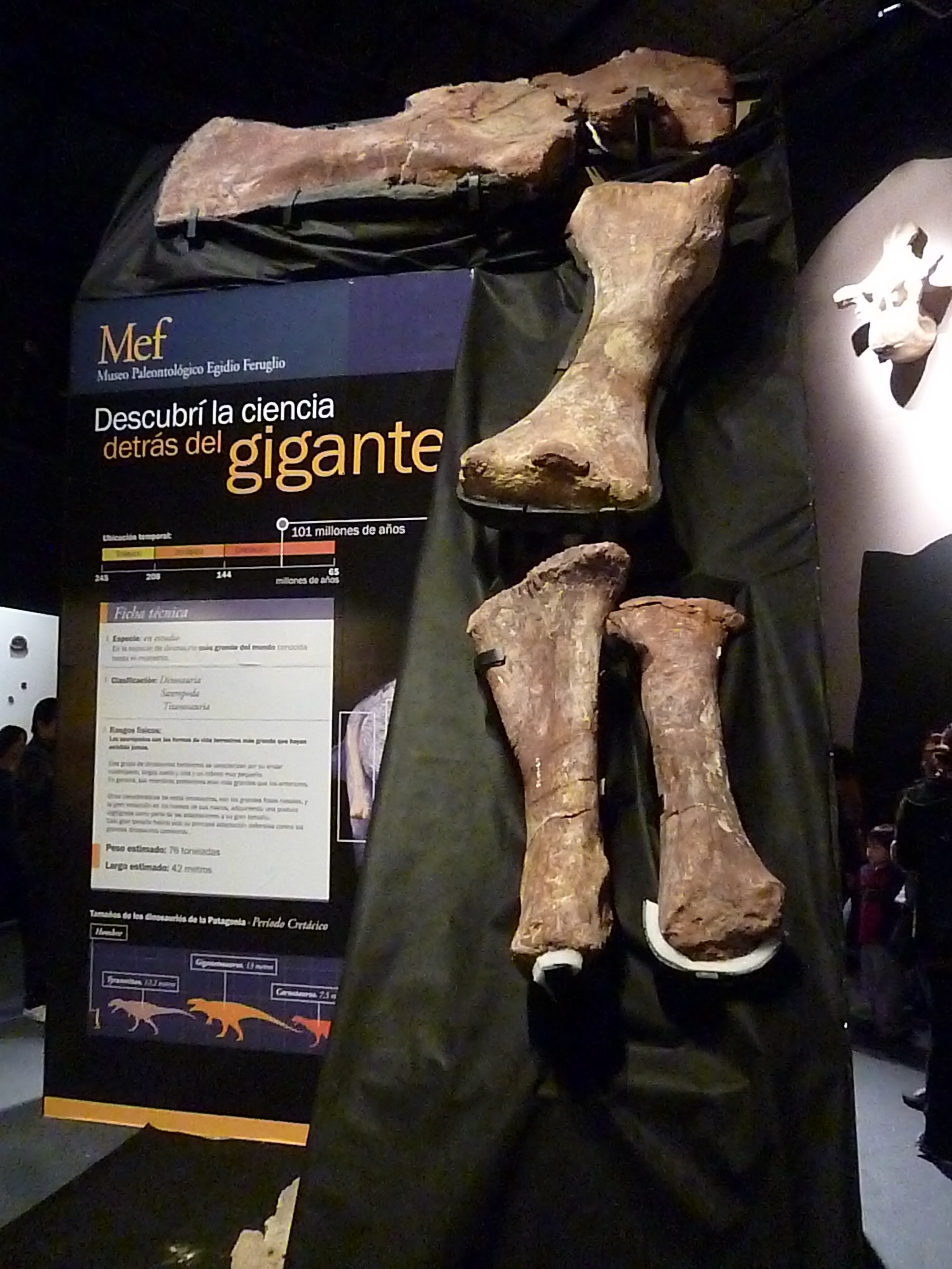 Fósiles del titanosauria del Chubut en el Museo Egidio Feruglio de Trelew, Chubut, Argentina. Descubiertos en 2013 y presentados en 2014, supuestamente se trata del animal terrestre más grande de la historia de la Tierra. Pesaría 4 toneladas más que el Argentinosaurus y su fémur mide más de dos metros.